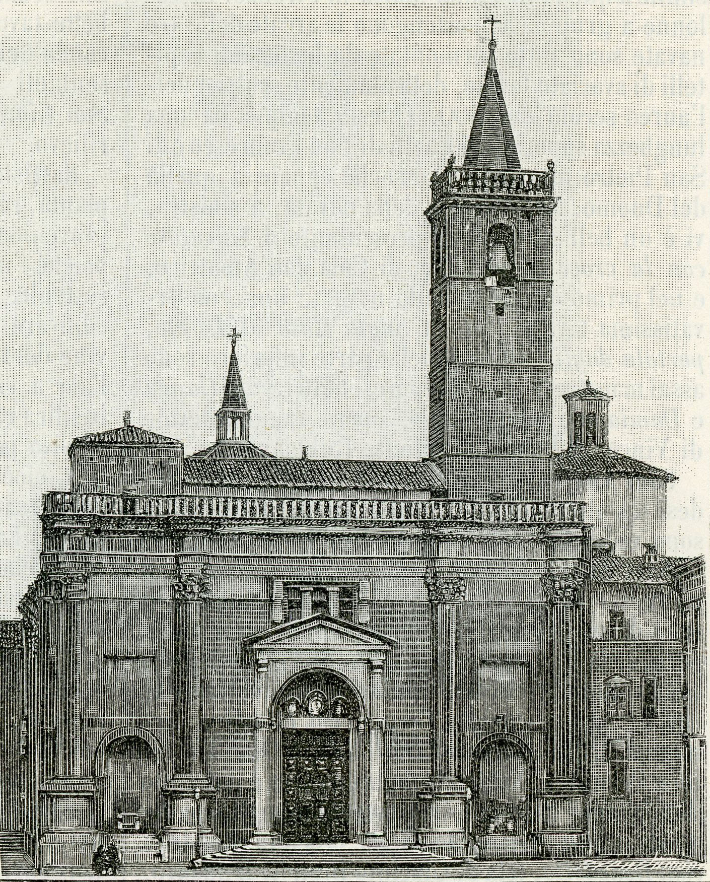 Ascoli Piceno: Cattedrale di Sant’Emidio (xilografia).